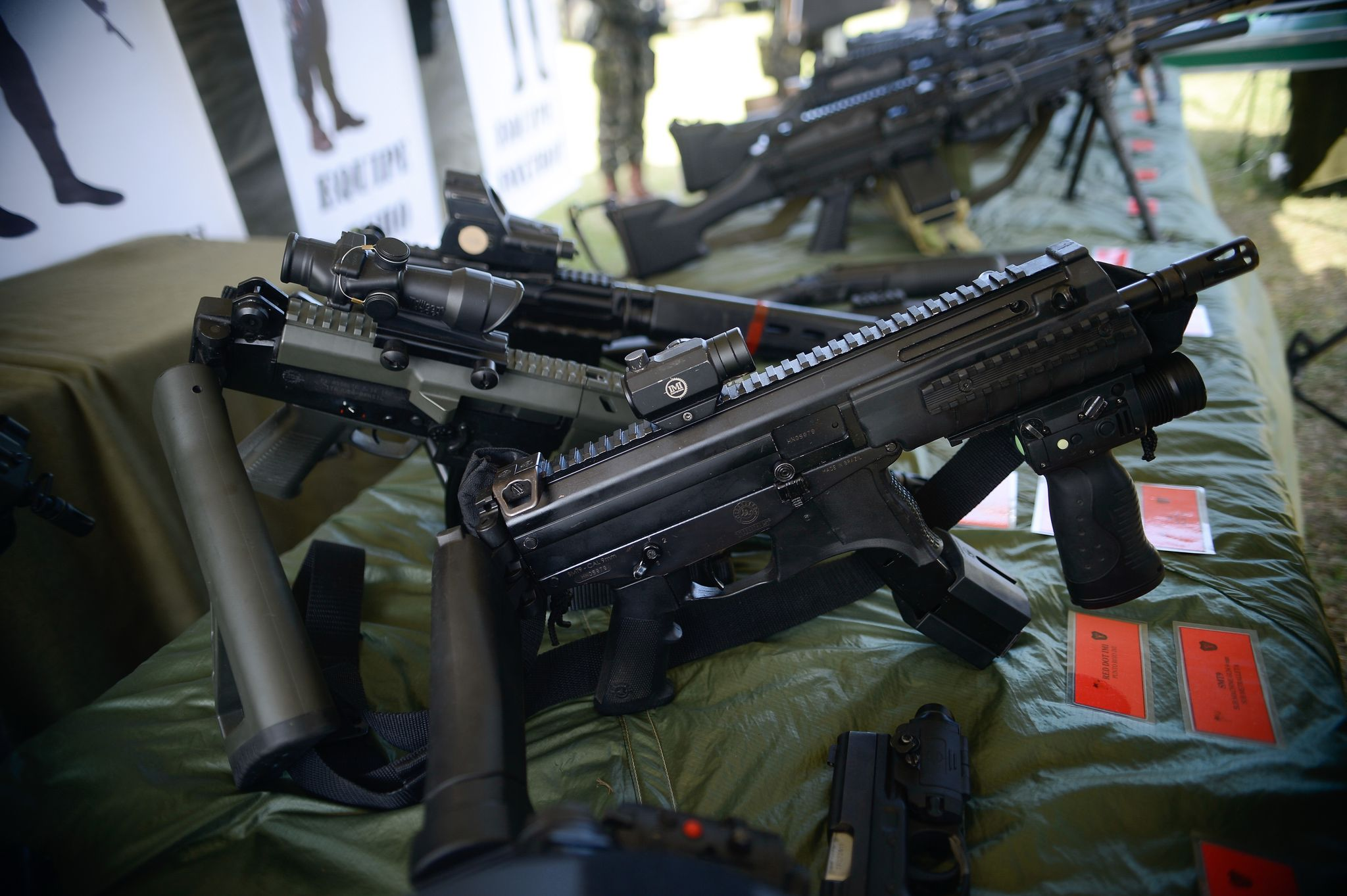 Imbel IA2 com coronha rebatida, durante apronto operacional da Brigada de Infantaria Paraquedista do Exército Brasileiro.